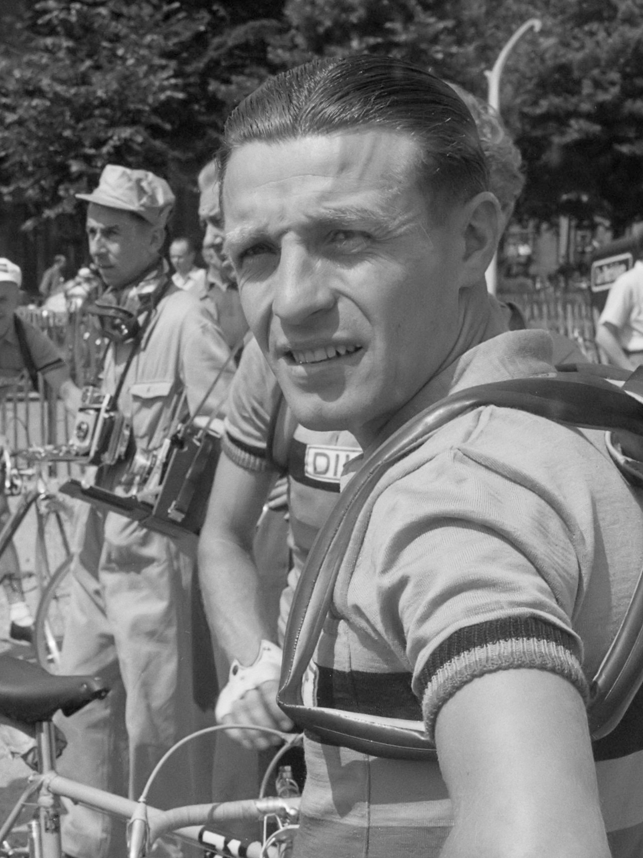 Tour de France. Stan Ockers (België) 4 juli 1951